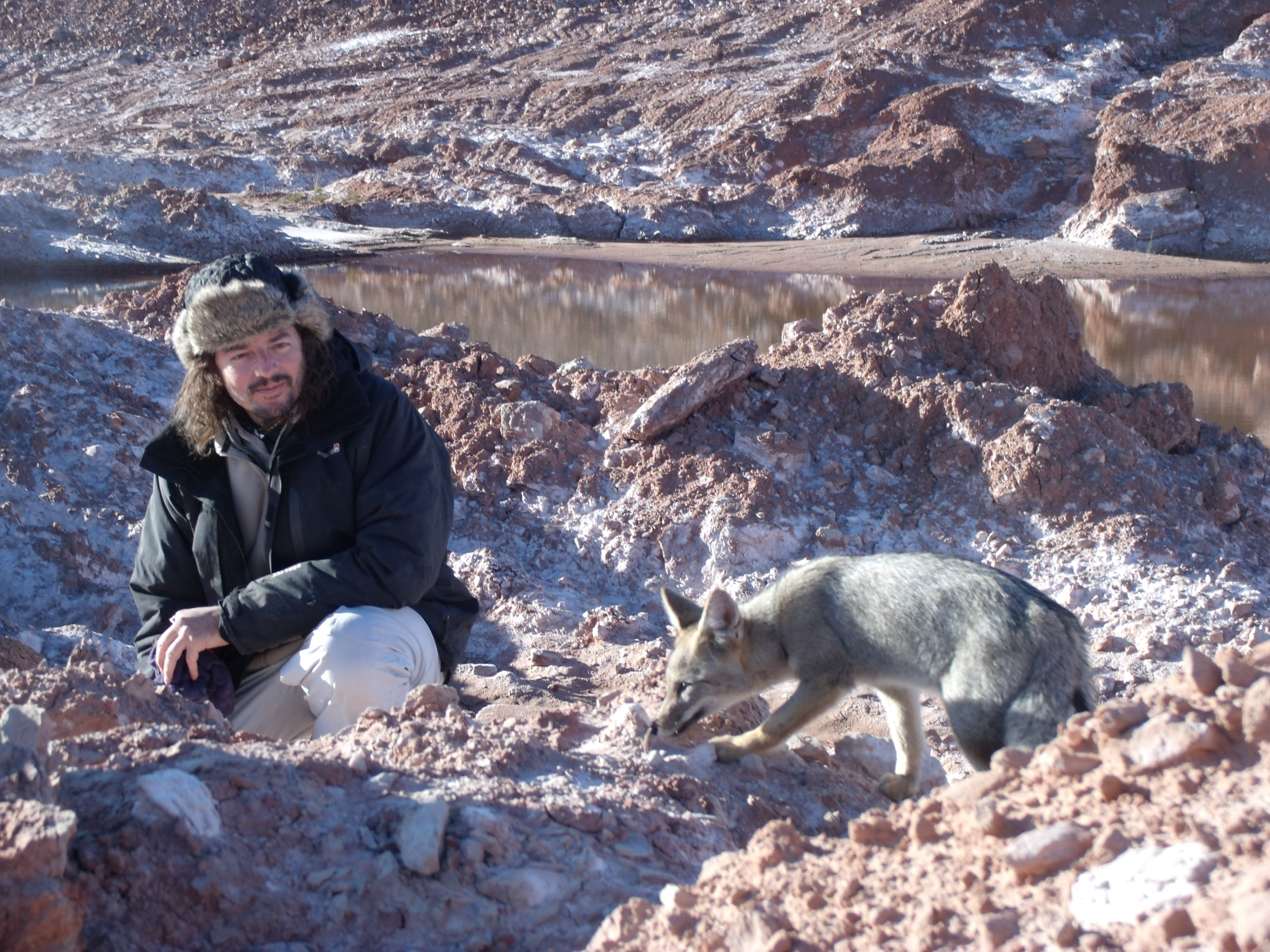 Preservacion de fauna nativa